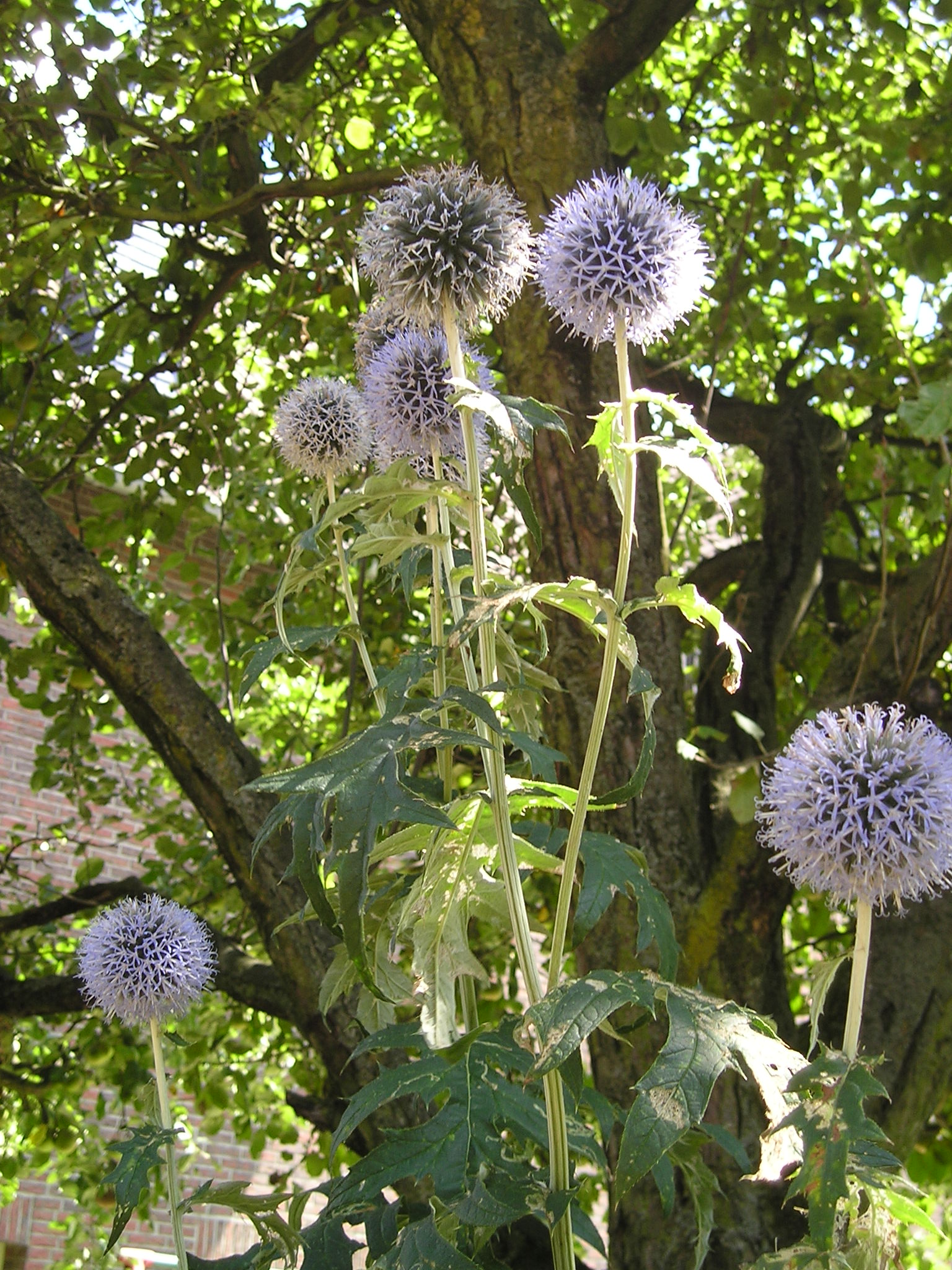 Ruthenische Kugeldistel, (Echinops ritro)